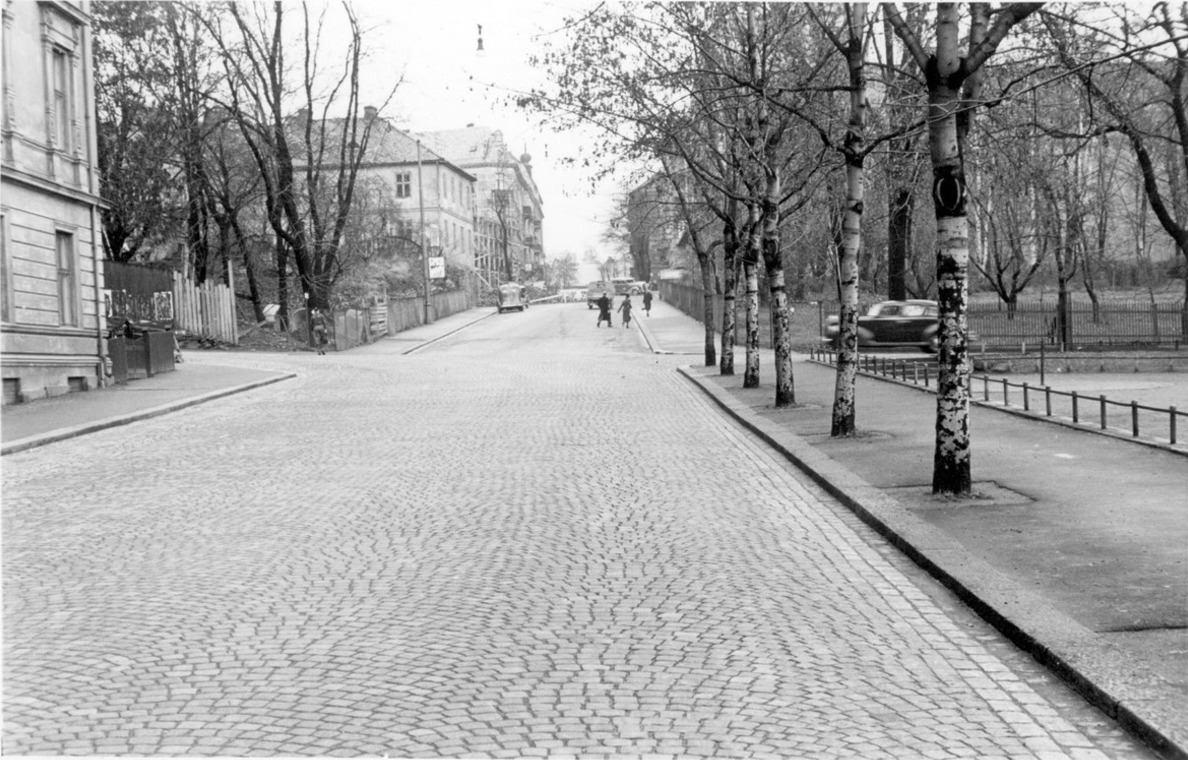 Parkveien, nedre del sett fra Reichweins gate oppover mot Cort Adlers gate